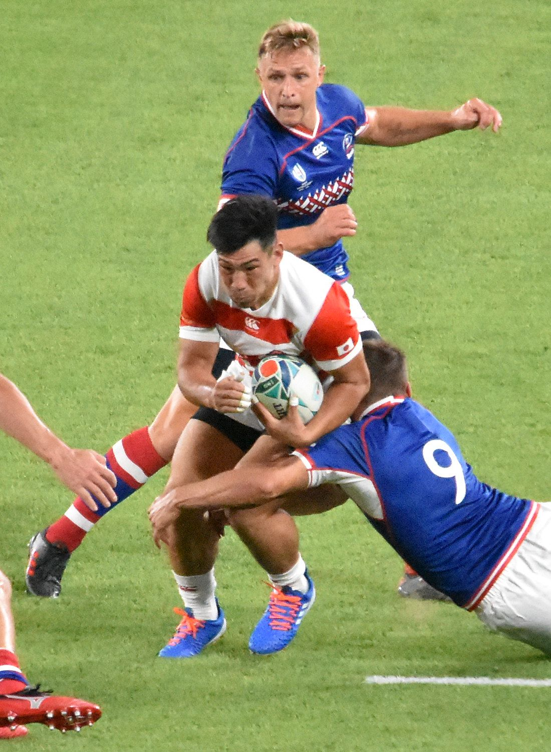 中村 亮土